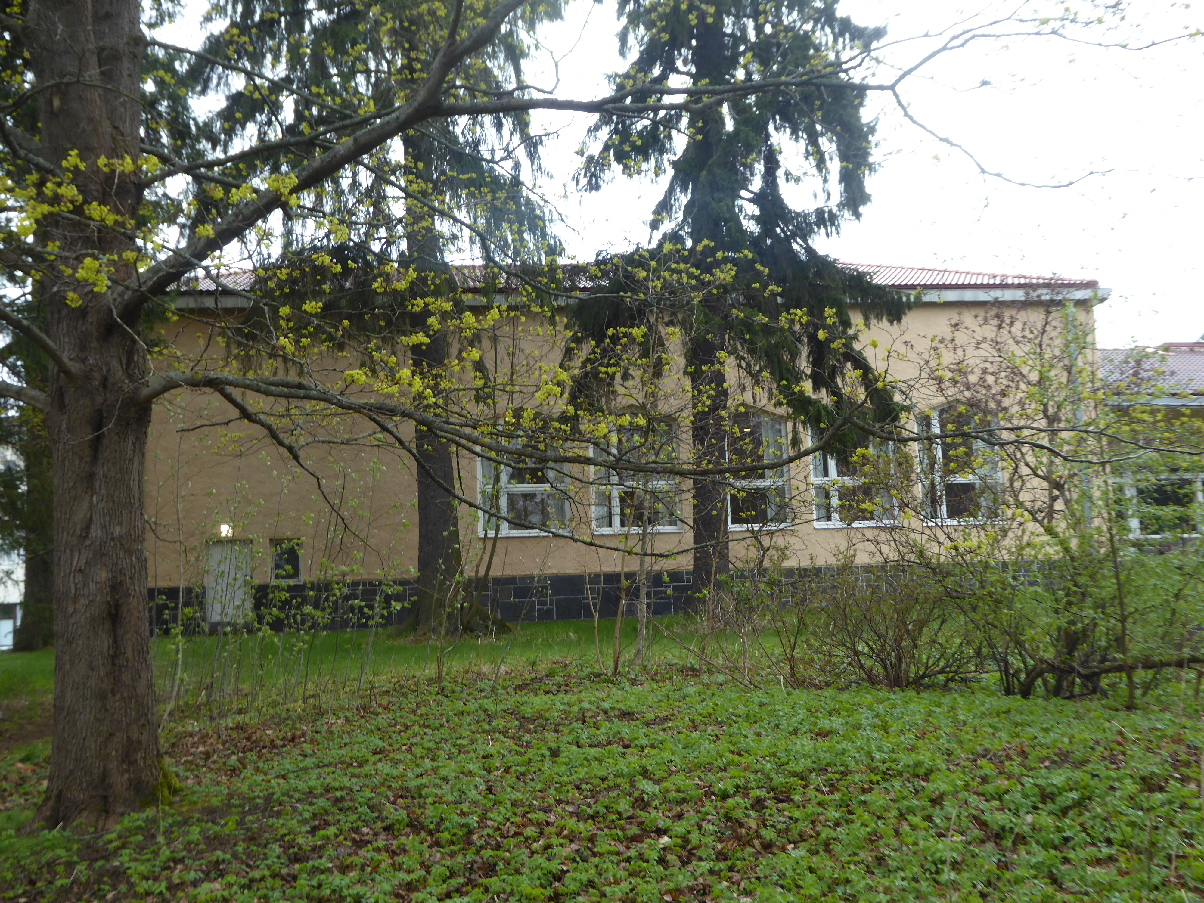 Roihuvuori